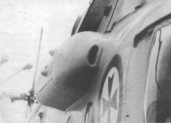 Mi-14PS - chwyt powietrza do instalacji klimatyzacji i zasilania. Przed chwytem godło śmigłowców ratowniczych: czerwony krzyż na białym tle z czerwoną obwódką. (opis oryginalny)